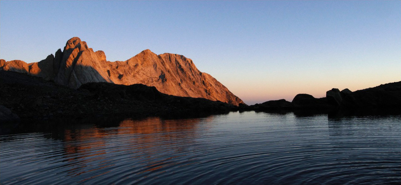 Le pic de Ger se reflète dans le lac de Cinda Blanque